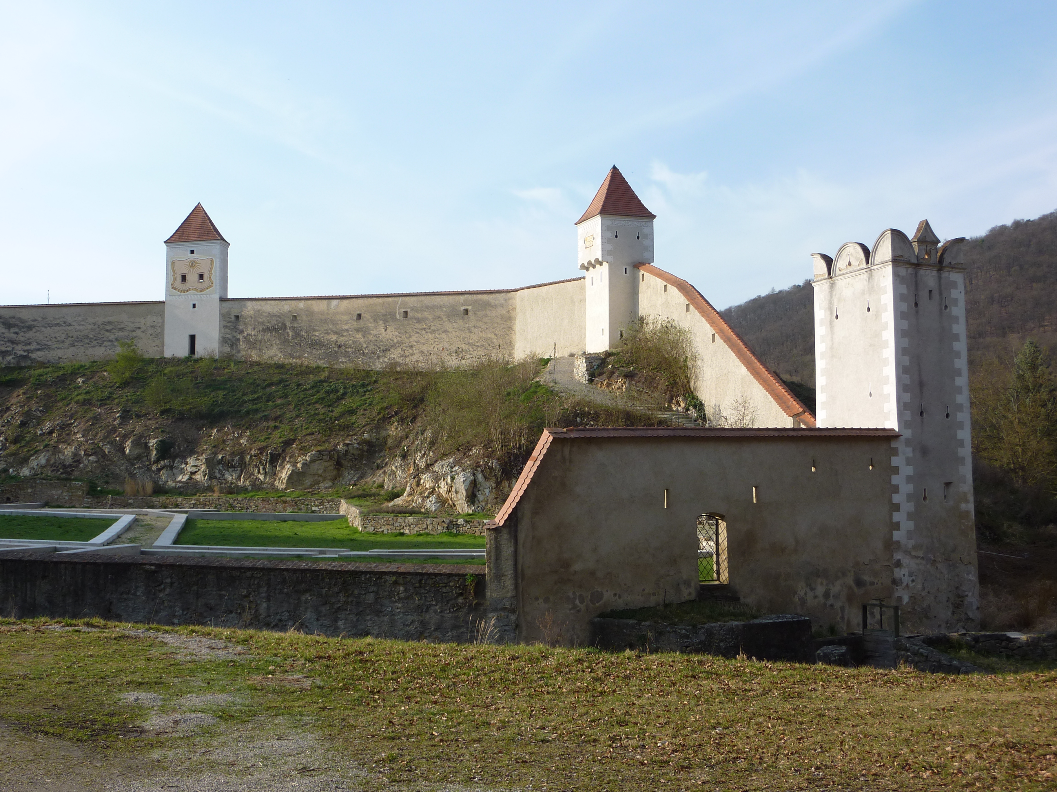 Nordteil der Kartause Aggsbach, Aggsbach-Dorf, Schönbühel-Aggsbach, Niederösterreich - Nachbildung der Grundmauern der Mönchshäuschen (Vorbereitung des Meditationsgartens), im Hintergrund Ringmauer